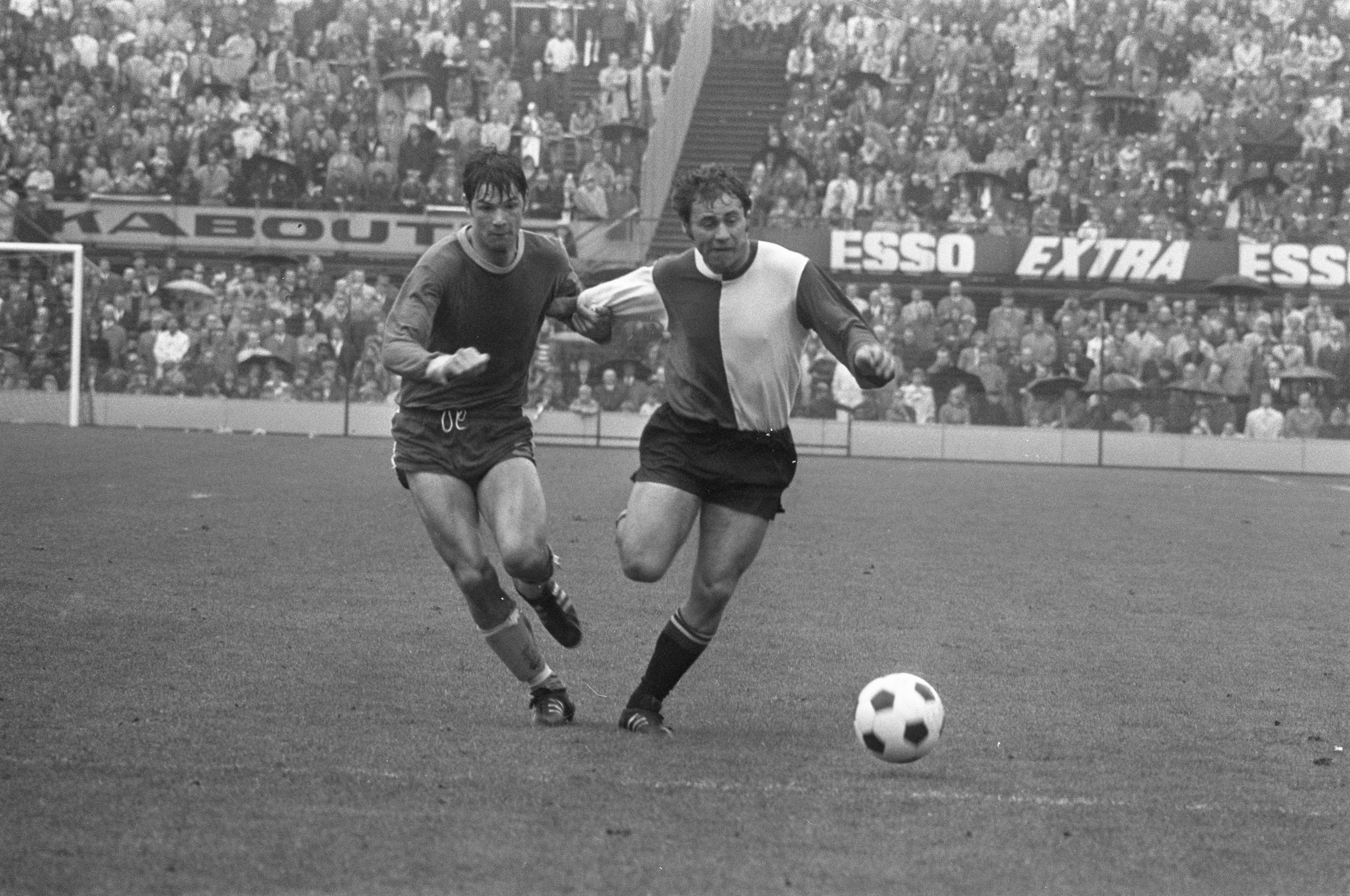 Collectie / Archief : Fotocollectie Anefo Reportage / Serie : Voetbalwedstrijd Feyenoord tegen FC Den Haag, eindstand 2-1 Beschrijving : Spelmoment. Links Joop Korevaar Datum : 30 april 1972 Locatie : Rotterdam, Zuid-Holland Trefwoorden : sport, voetbal Persoonsnaam : Korevaar,Joop Fotograaf : Fotograaf Onbekend / Anefo Auteursrechthebbende : Nationaal Archief Materiaalsoort : Negatief (zwart/wit) Nummer archiefinventaris : bekijk toegang 2.24.01.05 Bestanddeelnummer : 925-5670